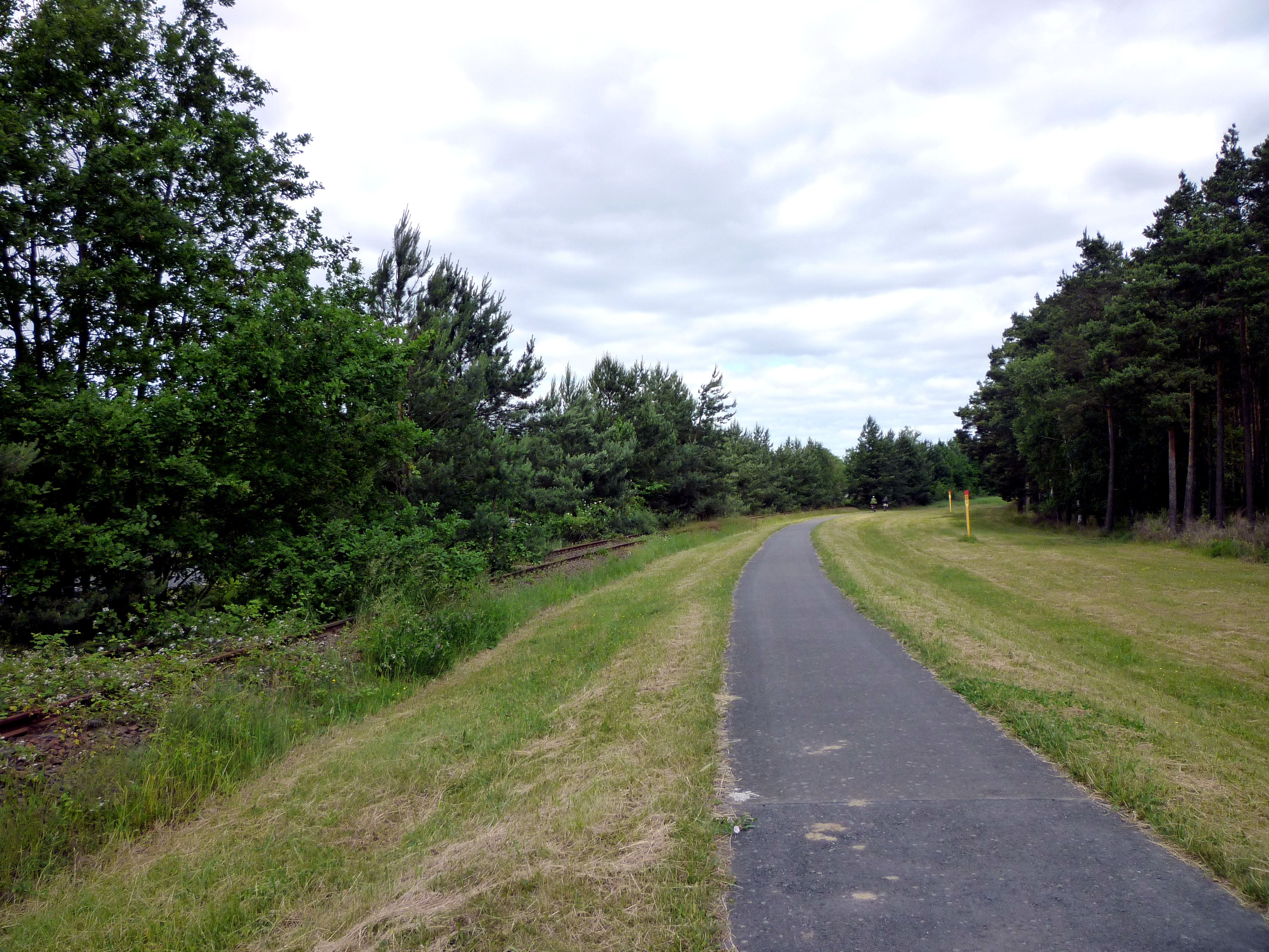 Neiße-Radweg zwischen Briesnig (Ortsteil von Forst (Lausitz)) und Grießen (Ortsteil von Jänschwalde), entlang der 1995 stillgelegten Bahnstrecke Guben–Forst